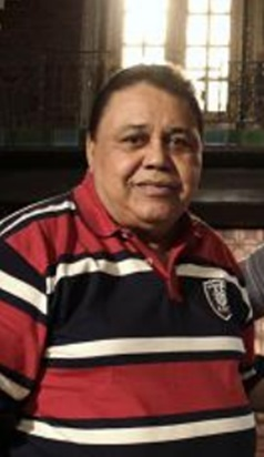 O sambista brasileiro (compositor e intérprete) Dominguinhos do Estácio.